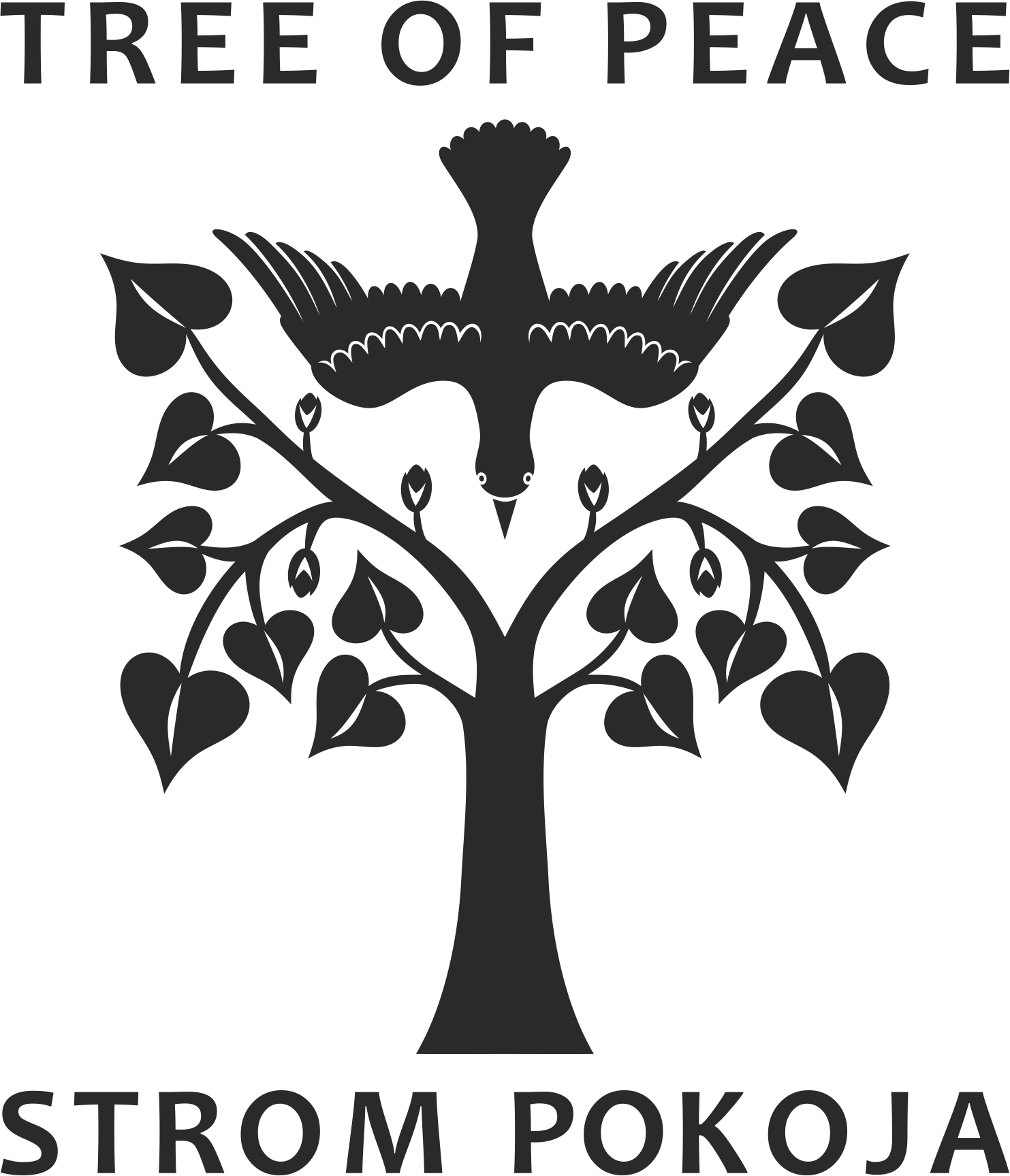 Projekt Logo